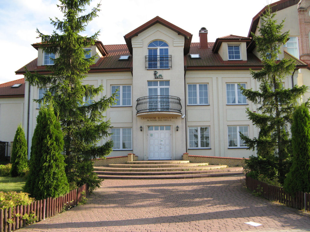 Centrum Katolickie im. Jana Pawła II w Łomży